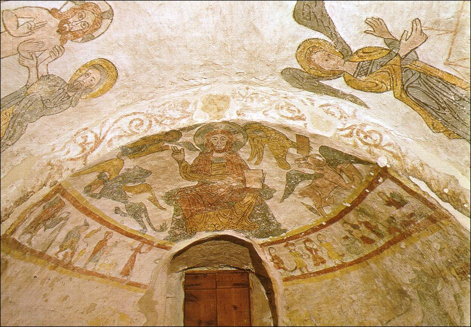 Pintures romàniques cripta nord de la Catedral de Roda d'Isàvena, (Huesca, Aragó España)